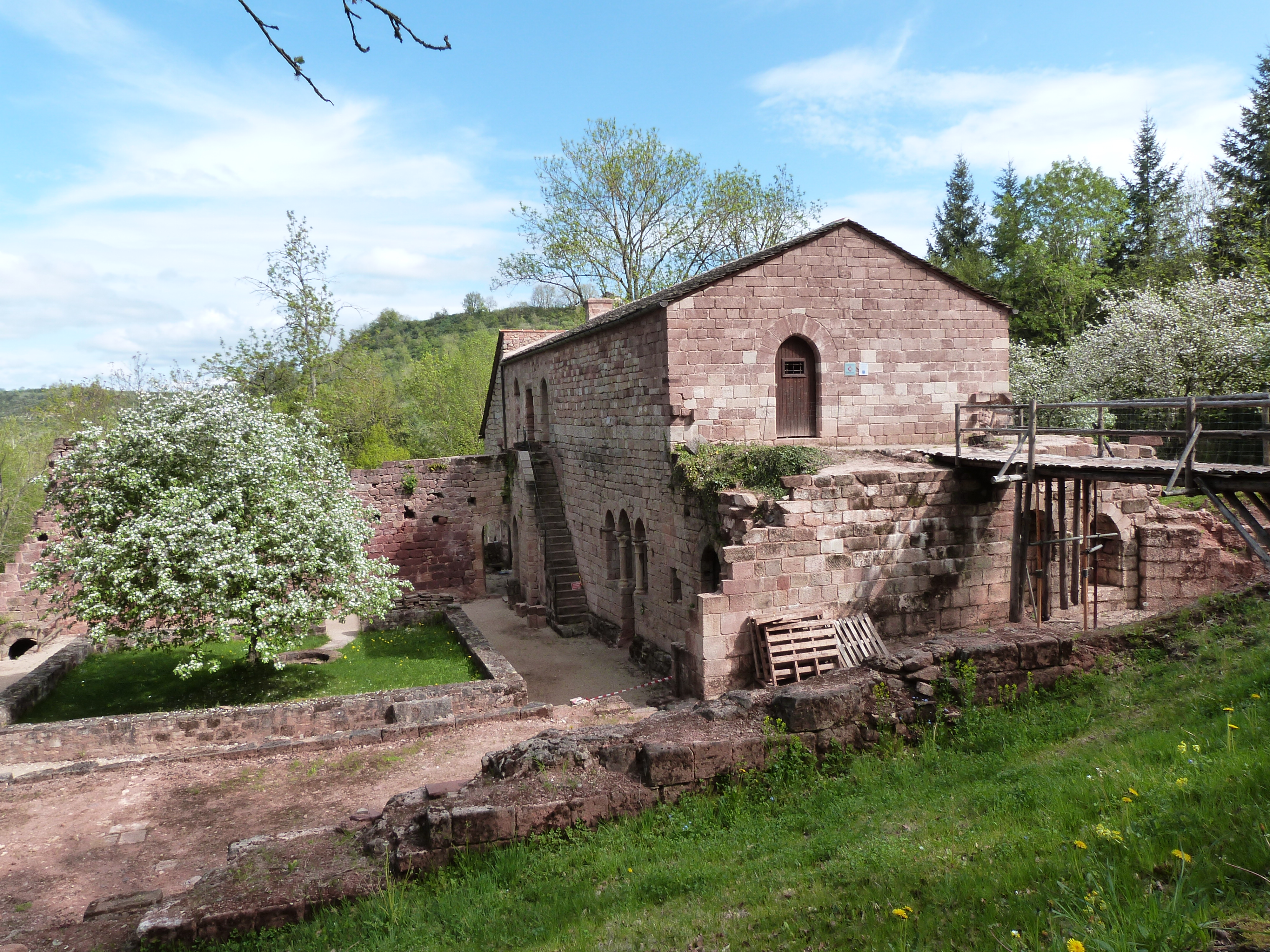 Prieuré du Sauvage